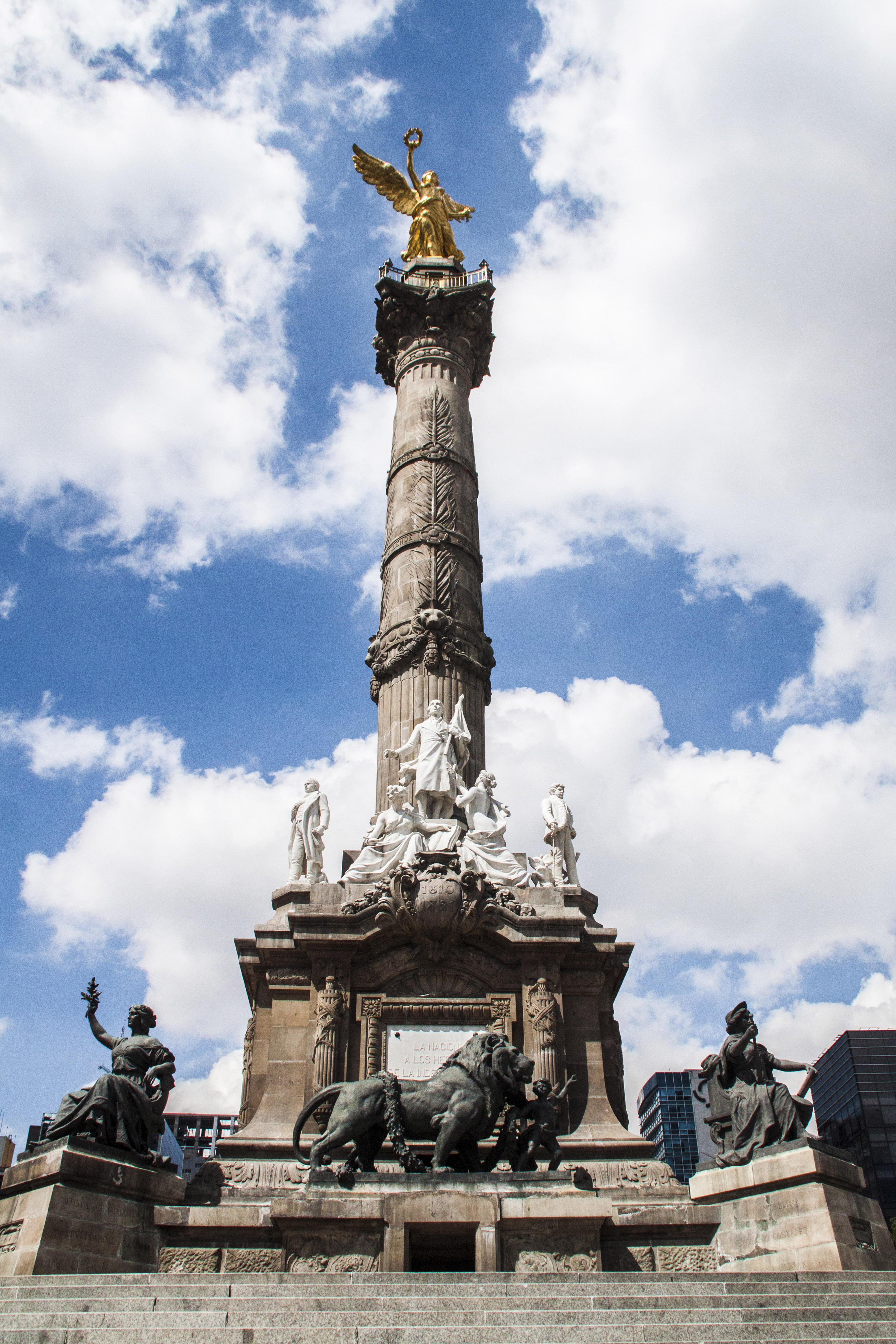 El Monumento a la Independencia, conocido popular y erróneamente como El Ángel es un monumento que se encuentra en la Ciudad de México, en la glorieta localizada en la confluencia de Paseo de la Reforma, Río Tiber y Florencia. Inaugurado en 1910 para conmemorar el Centenario de la independencia de México por el entonces presidente de México, Porfirio Díaz, es uno de los monumentos más emblemáticos de la urbe y usado actualmente como un icono cultural de la Ciudad de México y lugar de festejos y manifestaciones nacionales.